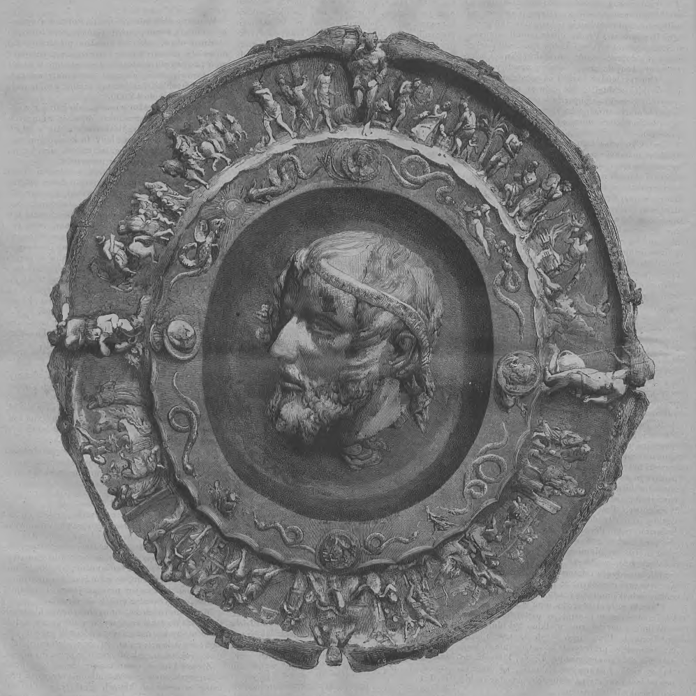 Teofil Lenartowicz "Głowa św. Jana Chrzciciela" z wystawy Towarzystwa Zachęty Sztuk Pięknych w Królestwie Polskim, opublikowana w: "Tygodnik ilustrowany", 1874, nr 346 z 3 (15) VIII 1874, t. XIV, seria II, str. 116, środkowy fragment strony.